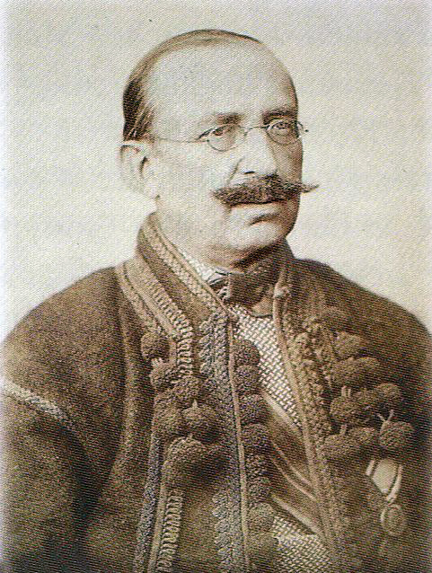 Fotografie von Jurij Fedkowytsch